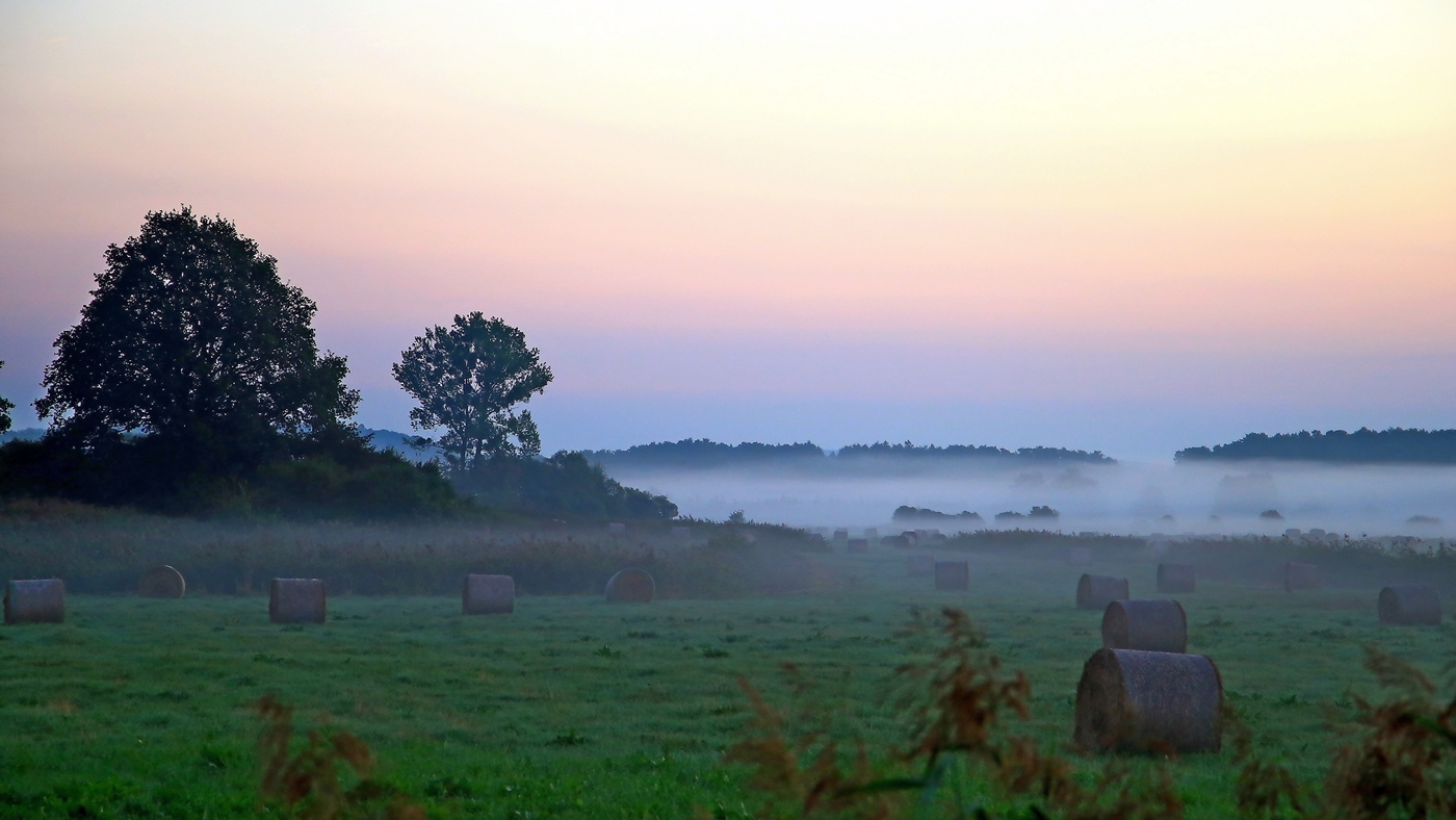 Herbstnebel bei Kieve in Mecklenburg